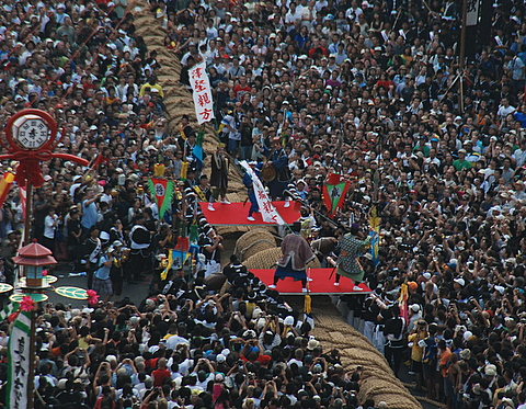 那覇大綱挽・支度我栄の様子